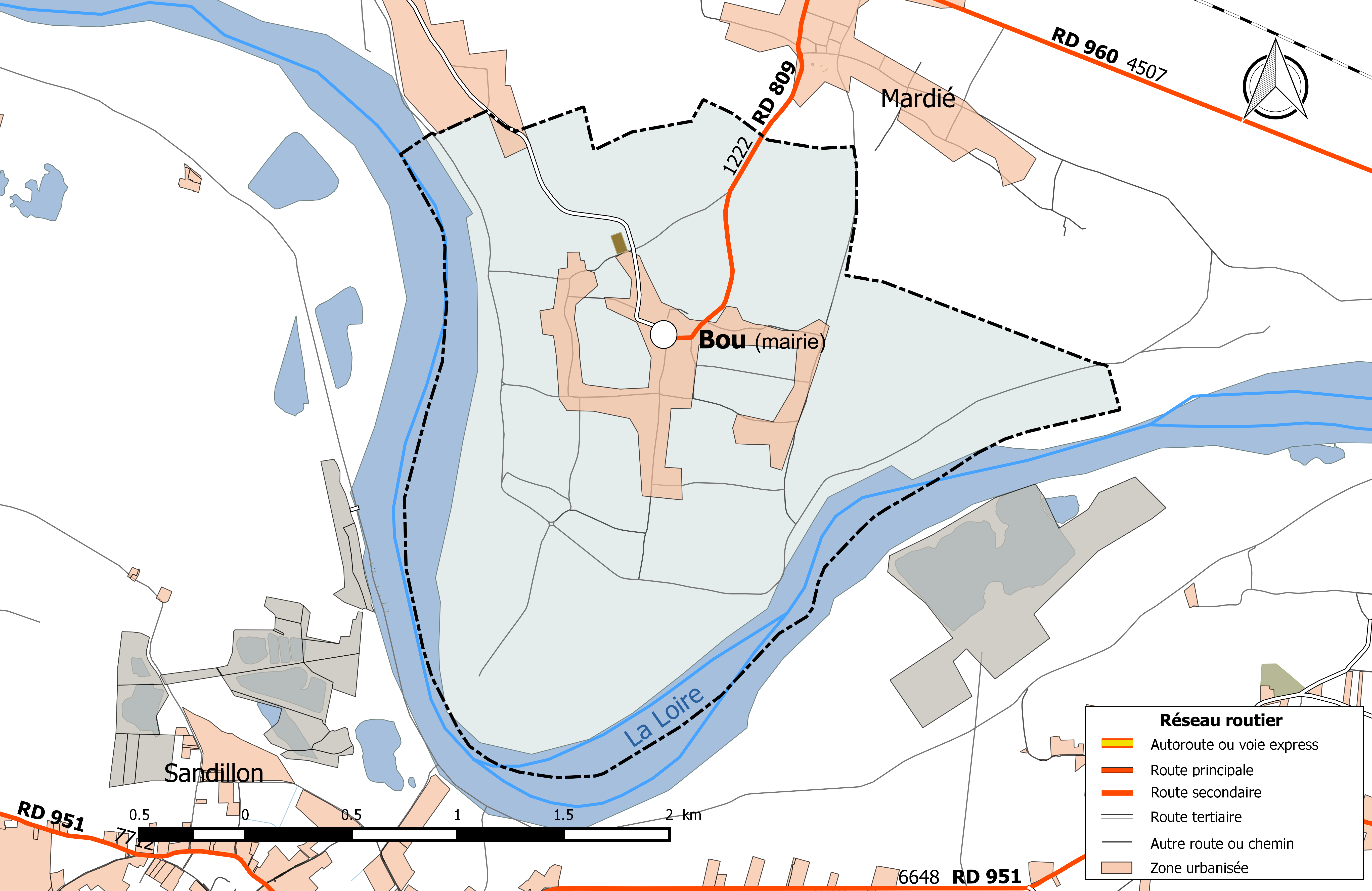 Carte du réseau routier de la commune de Bou.